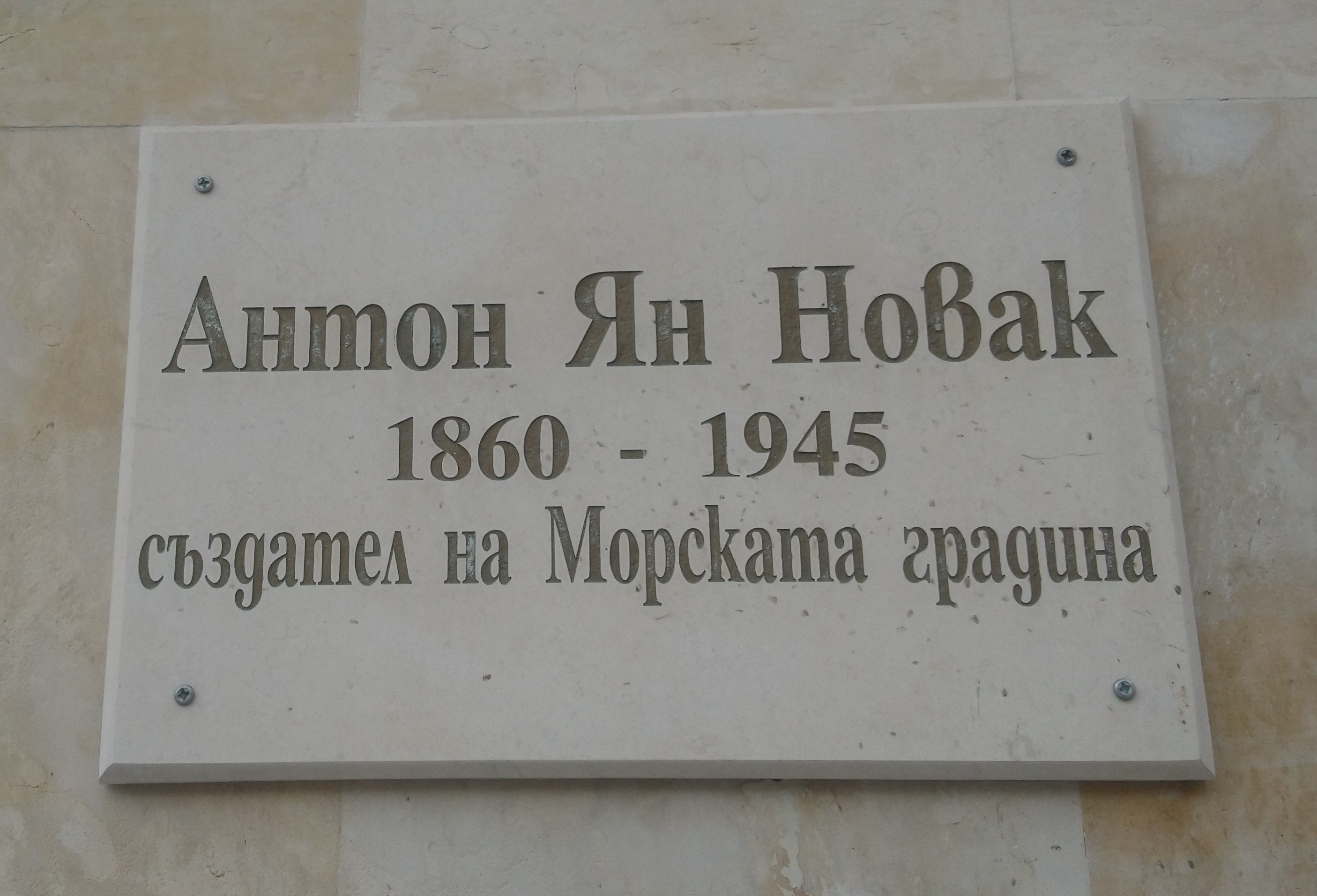 Паметна плоча на Антон Ян Новак на входа на Морската градина във Варна